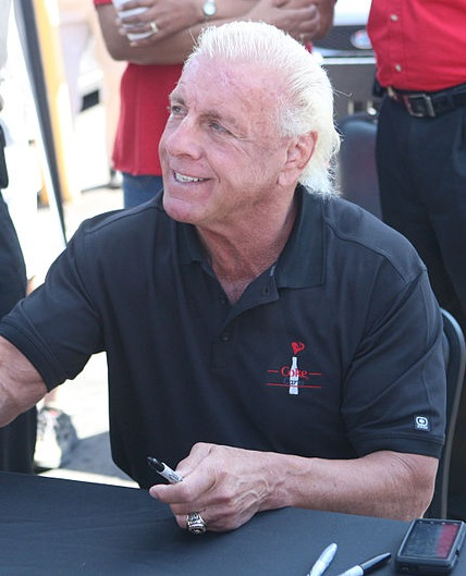 Questa immagine è un ritaglio di File:USMC-101015-M-3392W-002.jpg Licenza=